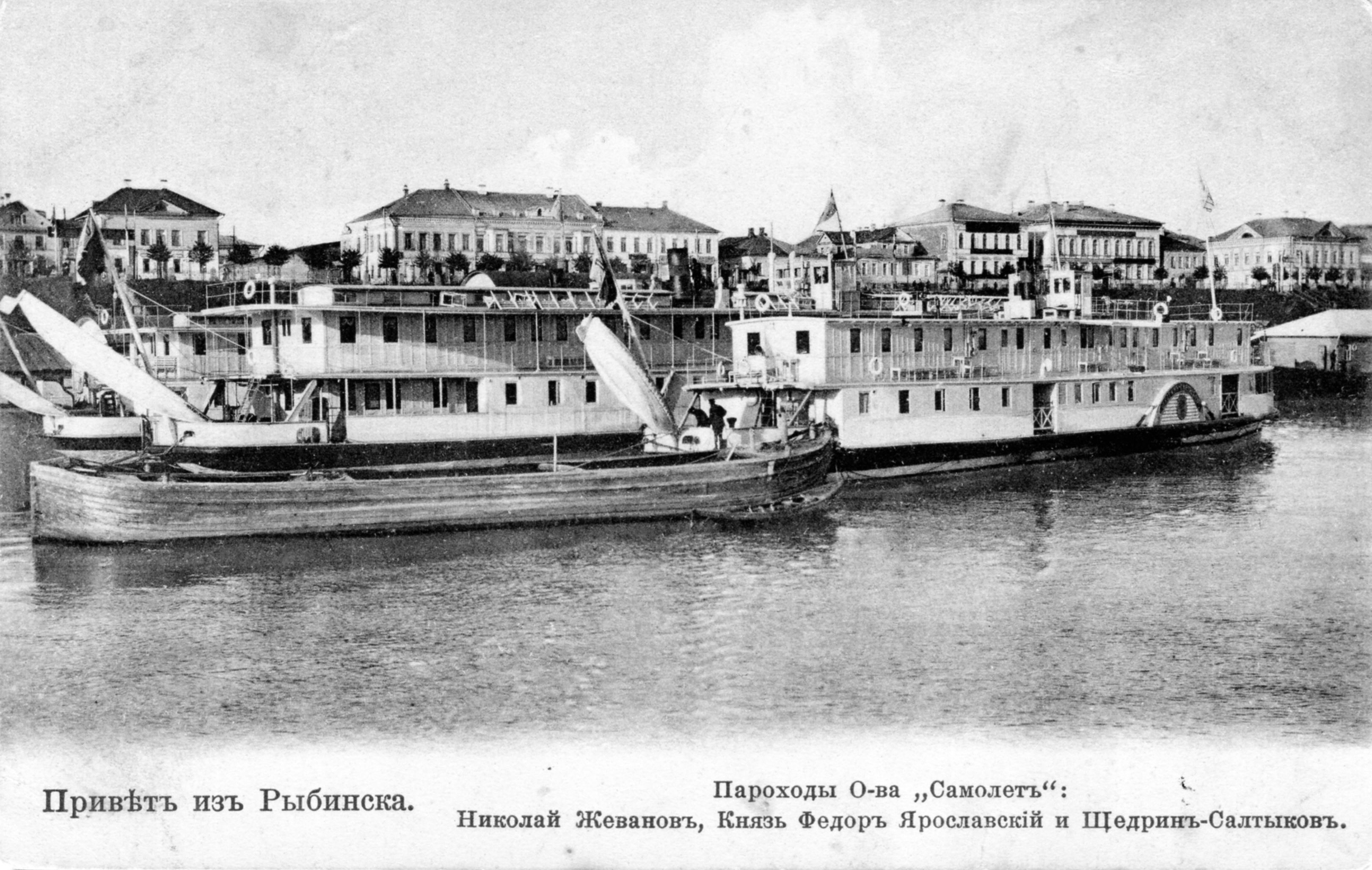 Пароходы Общества "Самолет" - "Николай Жеванов", "Князь Федор Ярославский" и "Щедрин-Салтыков" в Рыбинске